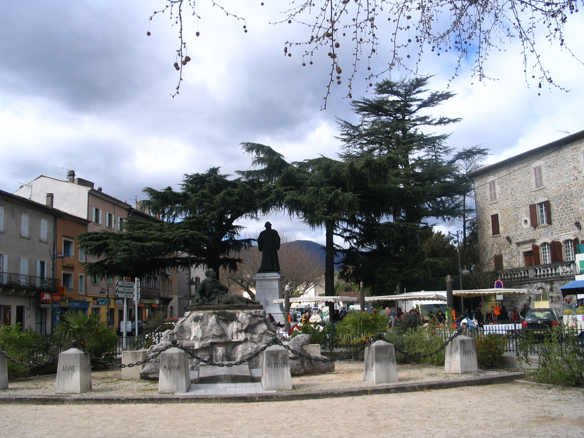 Market place in Les Vans